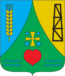 Герб Варвинського району